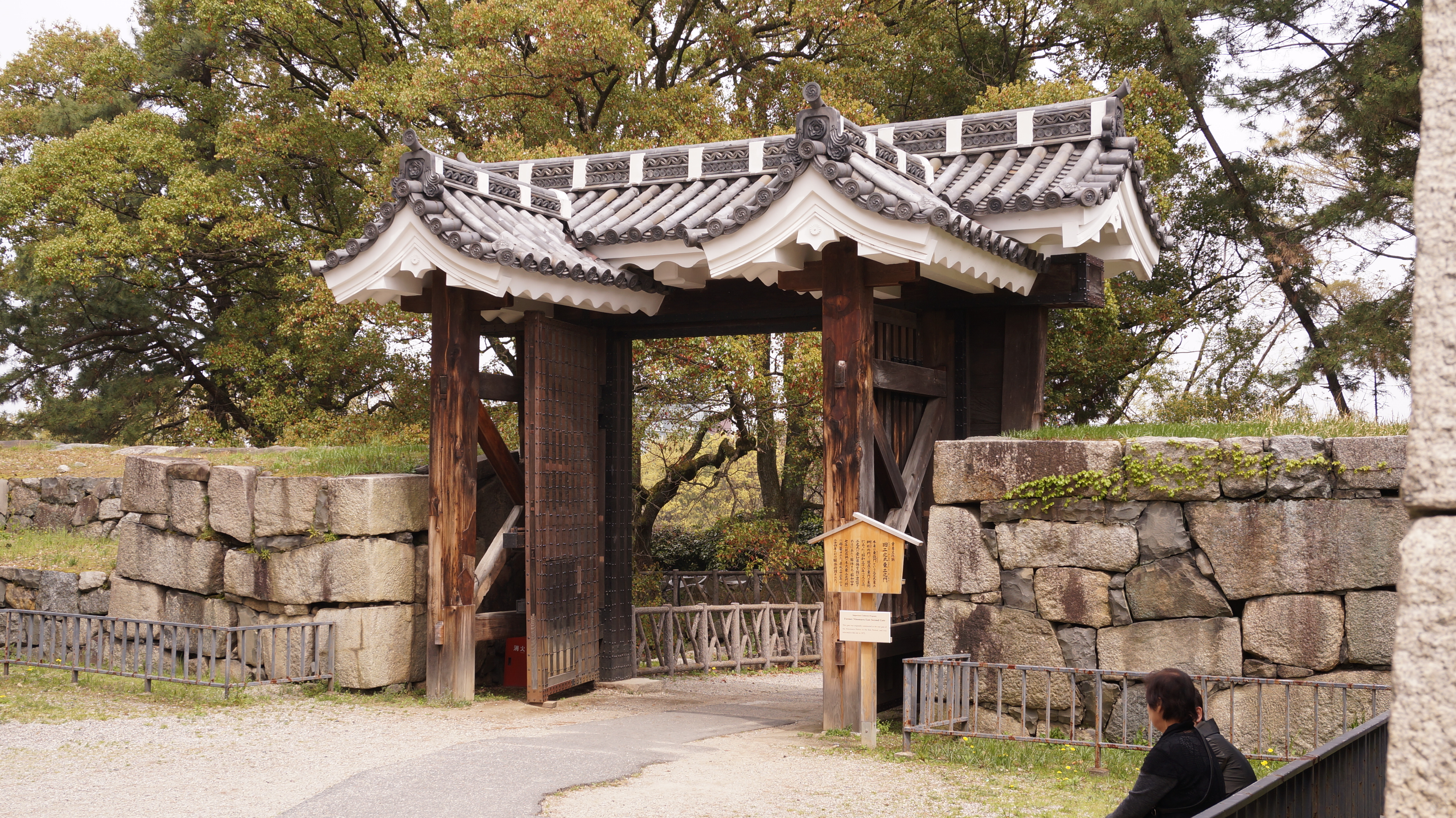 名古屋城 旧二之丸東ニ之門